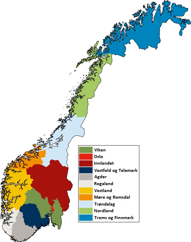 Kommune- og regionreform: "Stortinget vedtok 8. juni 2017 følgende sammenslåinger av fylker". Medfølgende kart-illustrasjon.